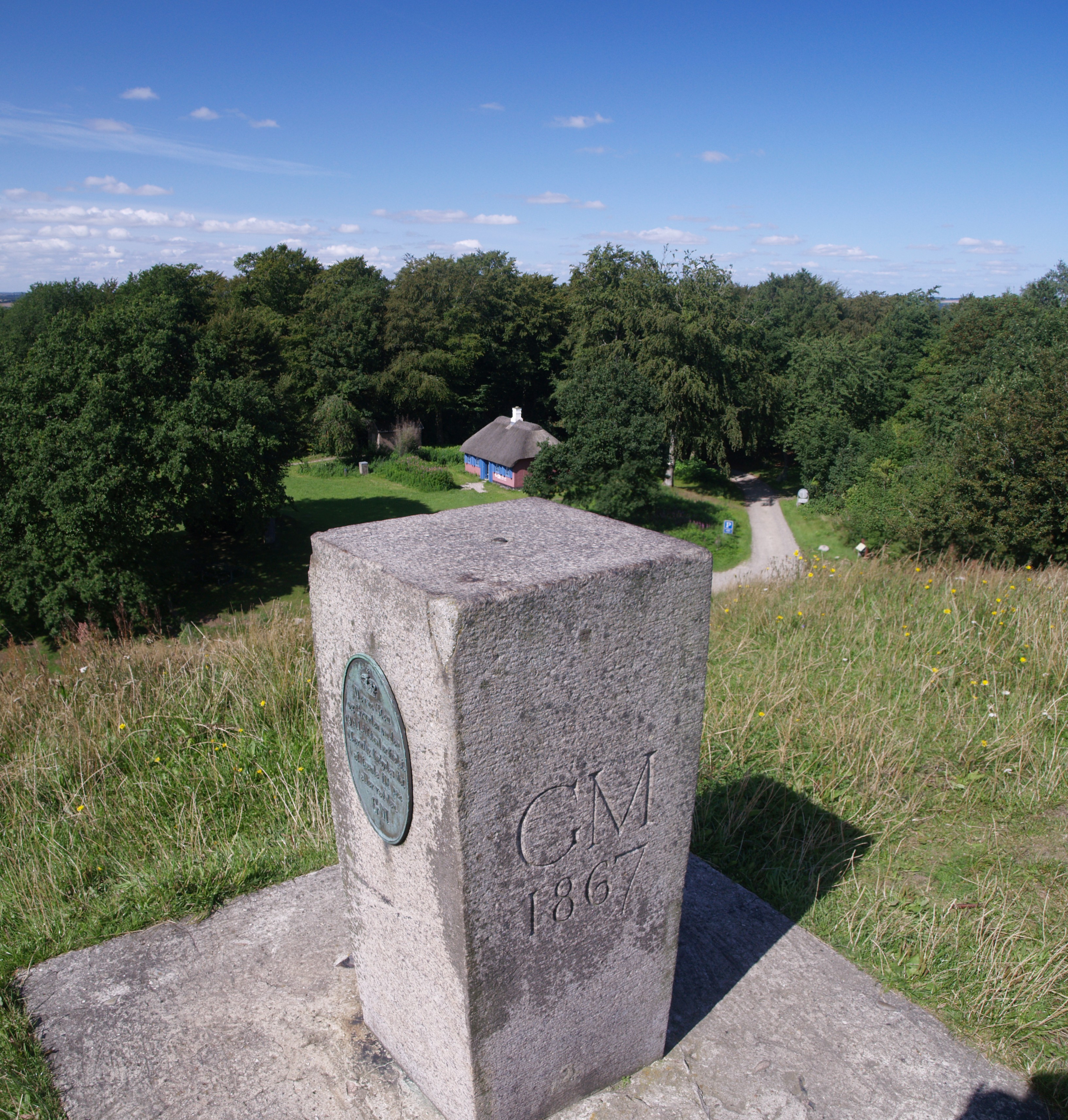 Hohøj